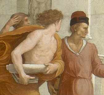 Détail de l’École d’Athènes, représentant Diagoras (gauche) et Critias (droite)